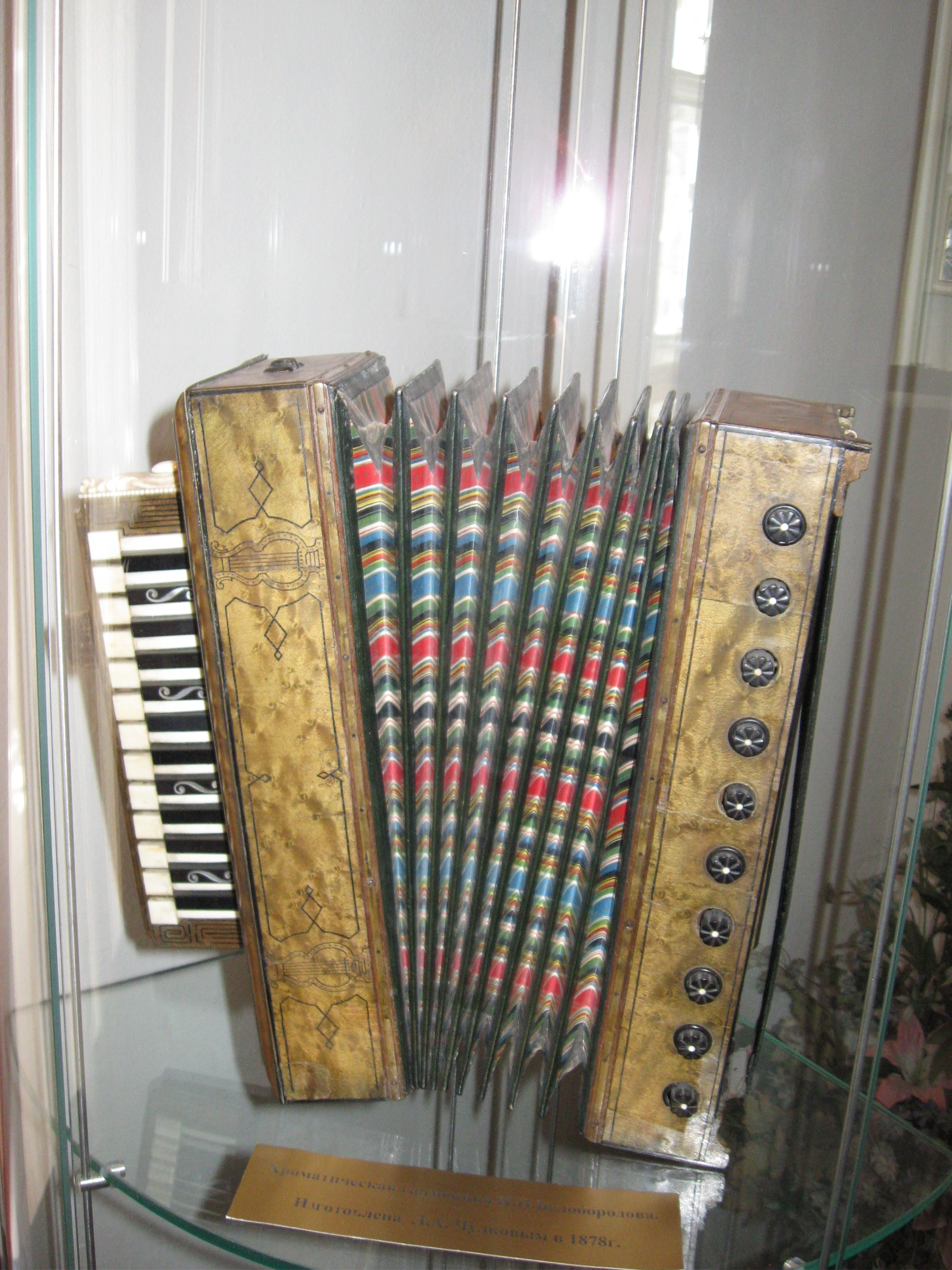 Хроматическая гармоника Н. И. Белобородова. Изготовлена Л. А. Чулковым в 1878 г.